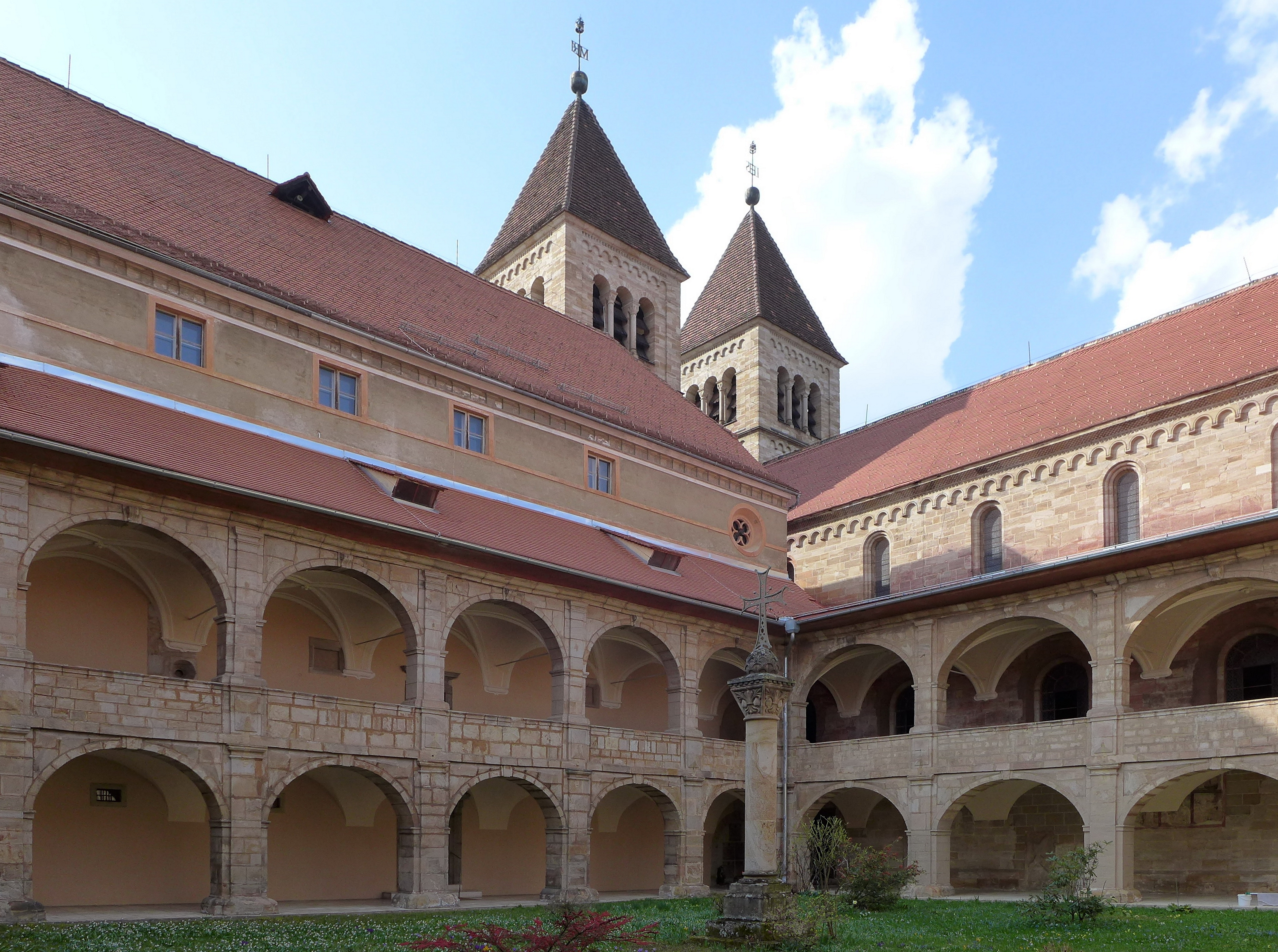 Abtei Seckau - Innerer Klosterhof